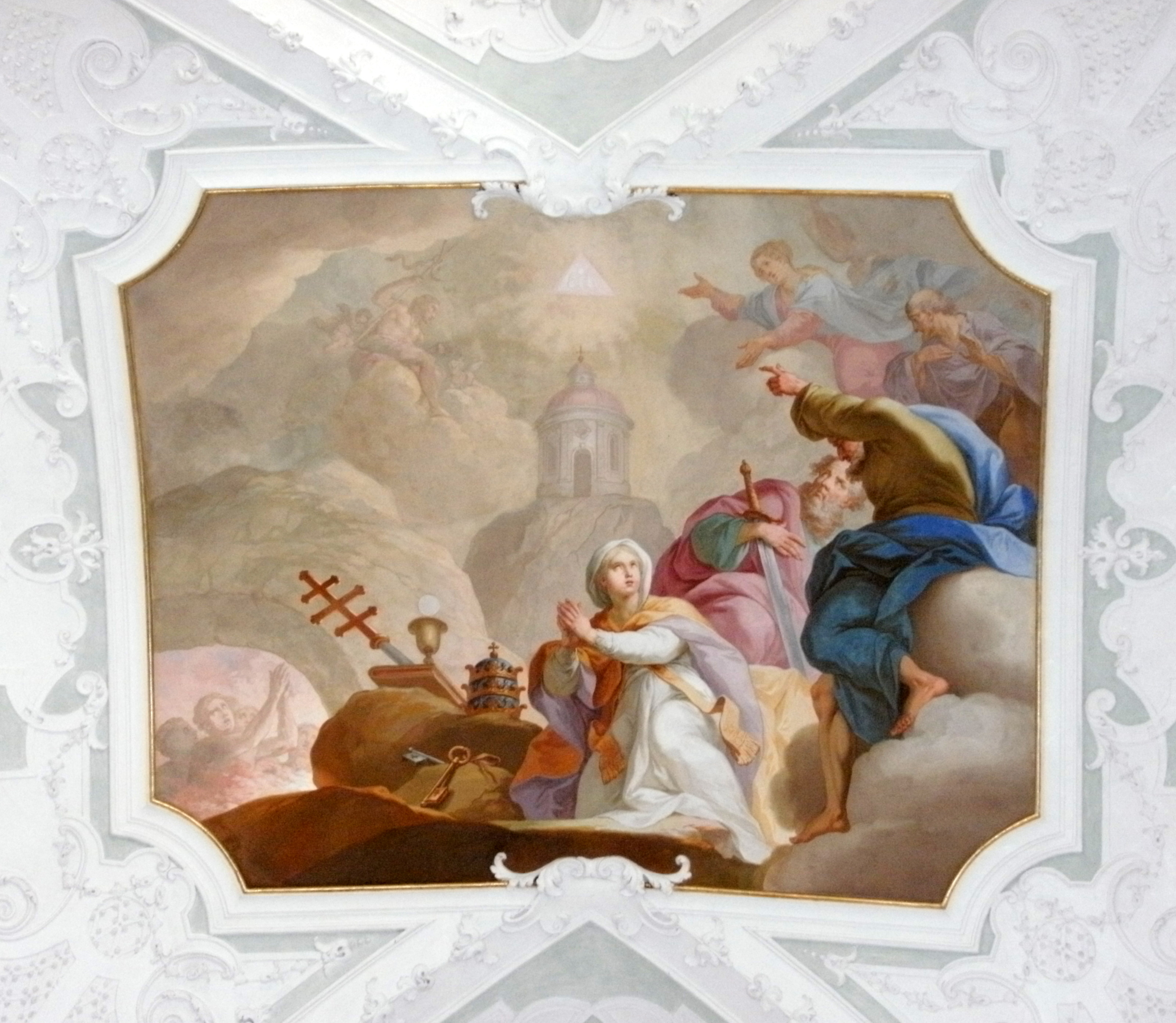 Zwölf Glaubensartikel